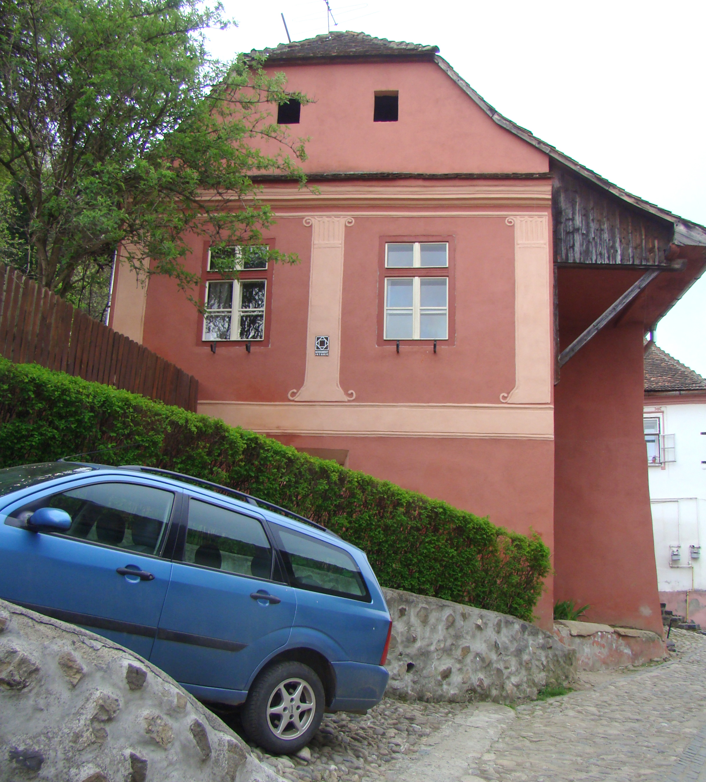 Casa Heinz, municipiul Sighişoara, str. Cojocarilor 3-5 sec. XVII